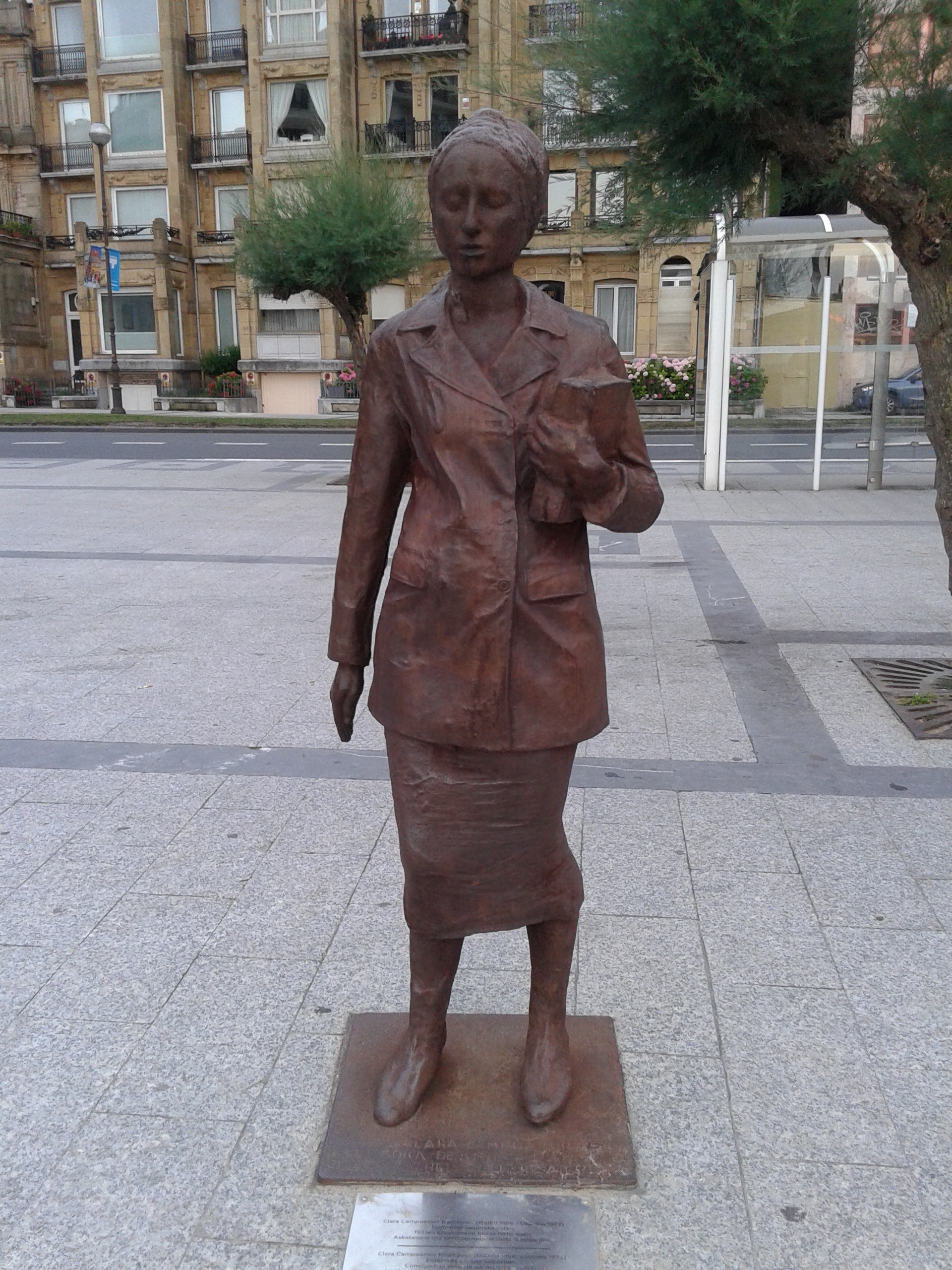 Donostiako Mirakontxan Dora Salazara eskultorearen lan hau jarrita dago.